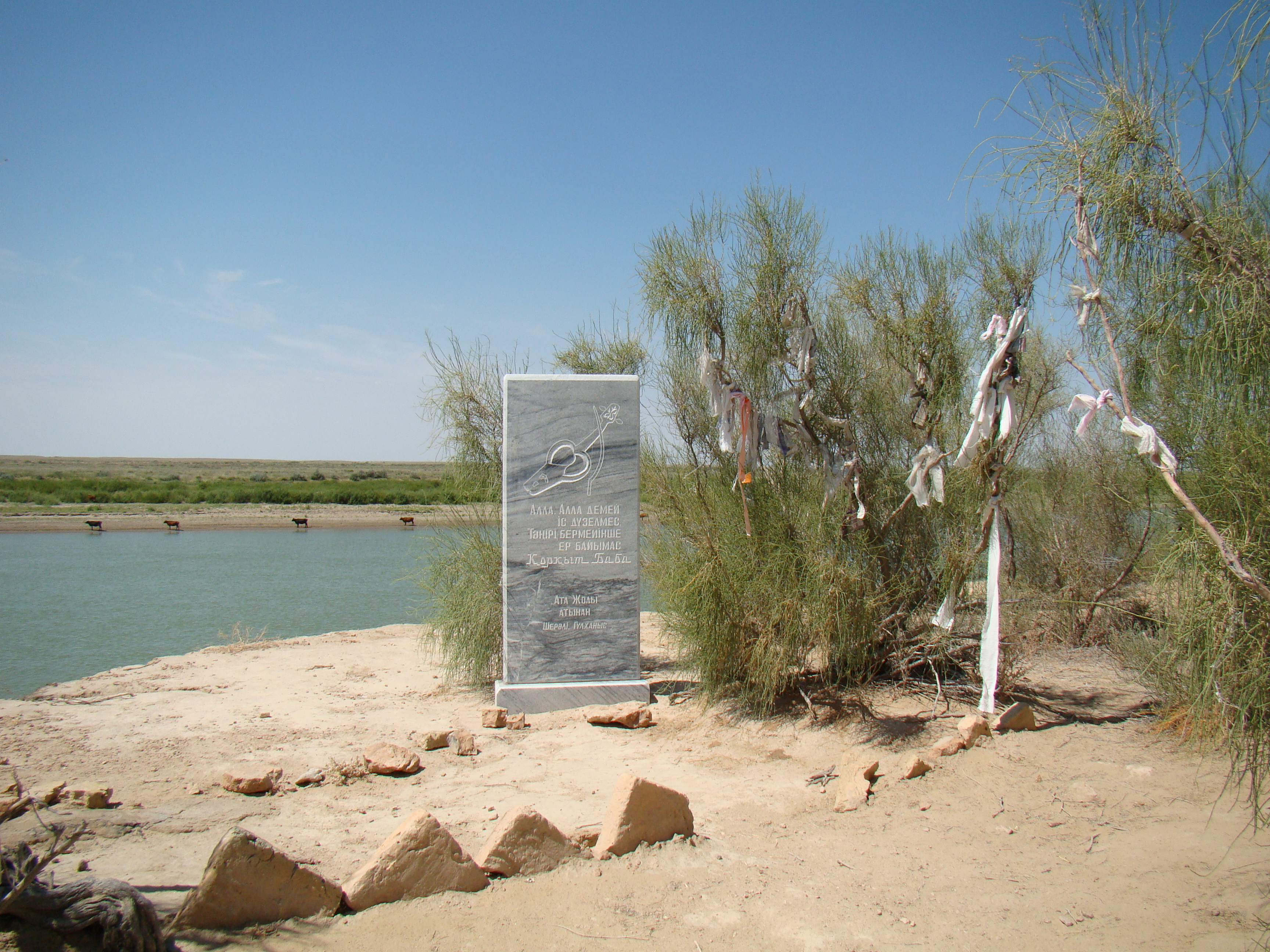 Берег Сырдарьи, стела на том месте, где находился мазар Коркут-ата.